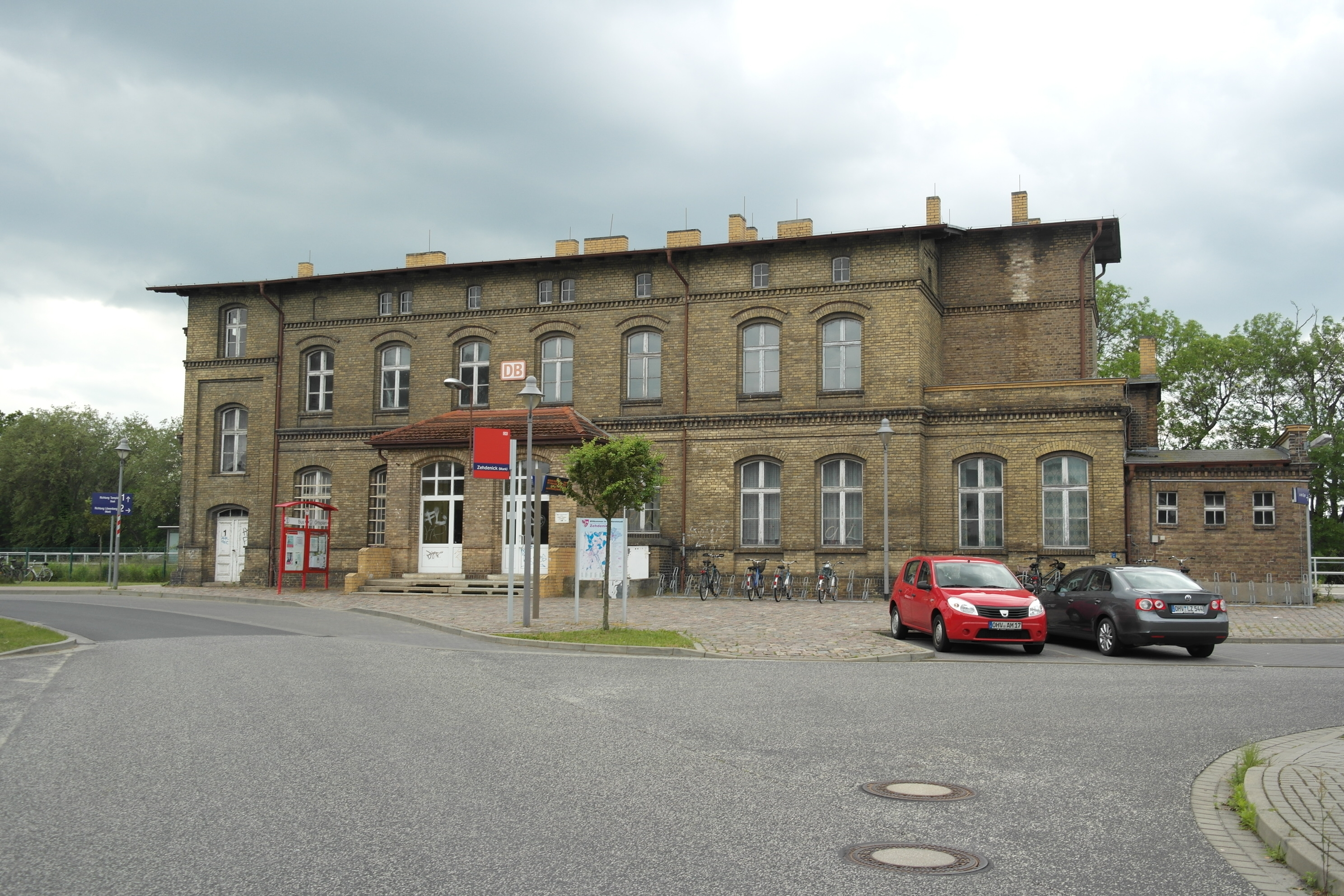 Bahnhof Zehdenick, Baudenkmal, Blick von der Straßenseite